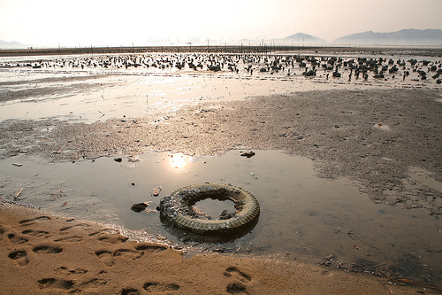 中文（香港）: 香港下白泥的淺灘。